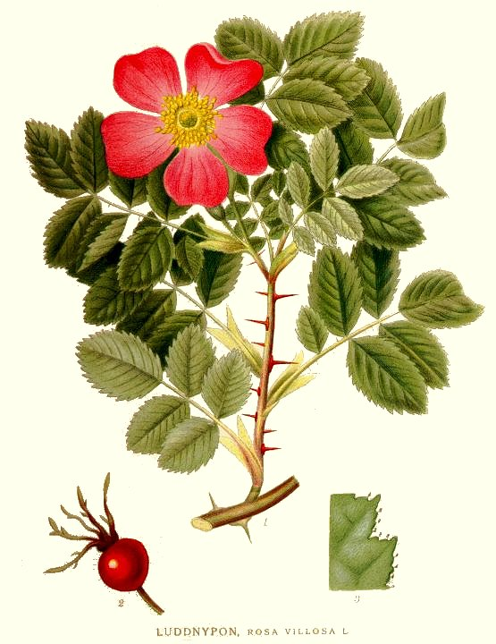 Rosa villosa L. Original Description Luddnypon, Rosa villosa L.